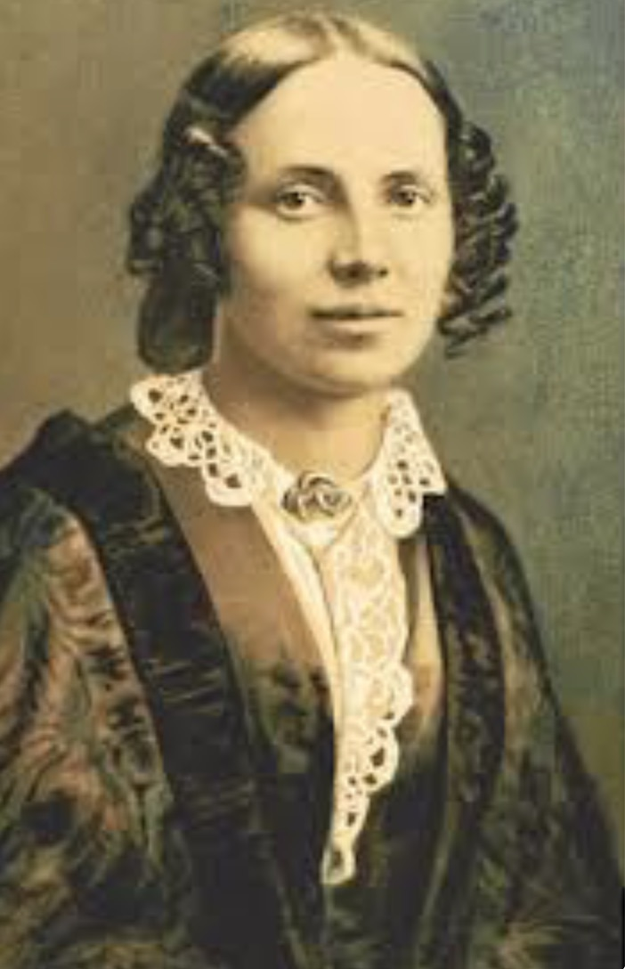 Depicted person: Regine Olsen